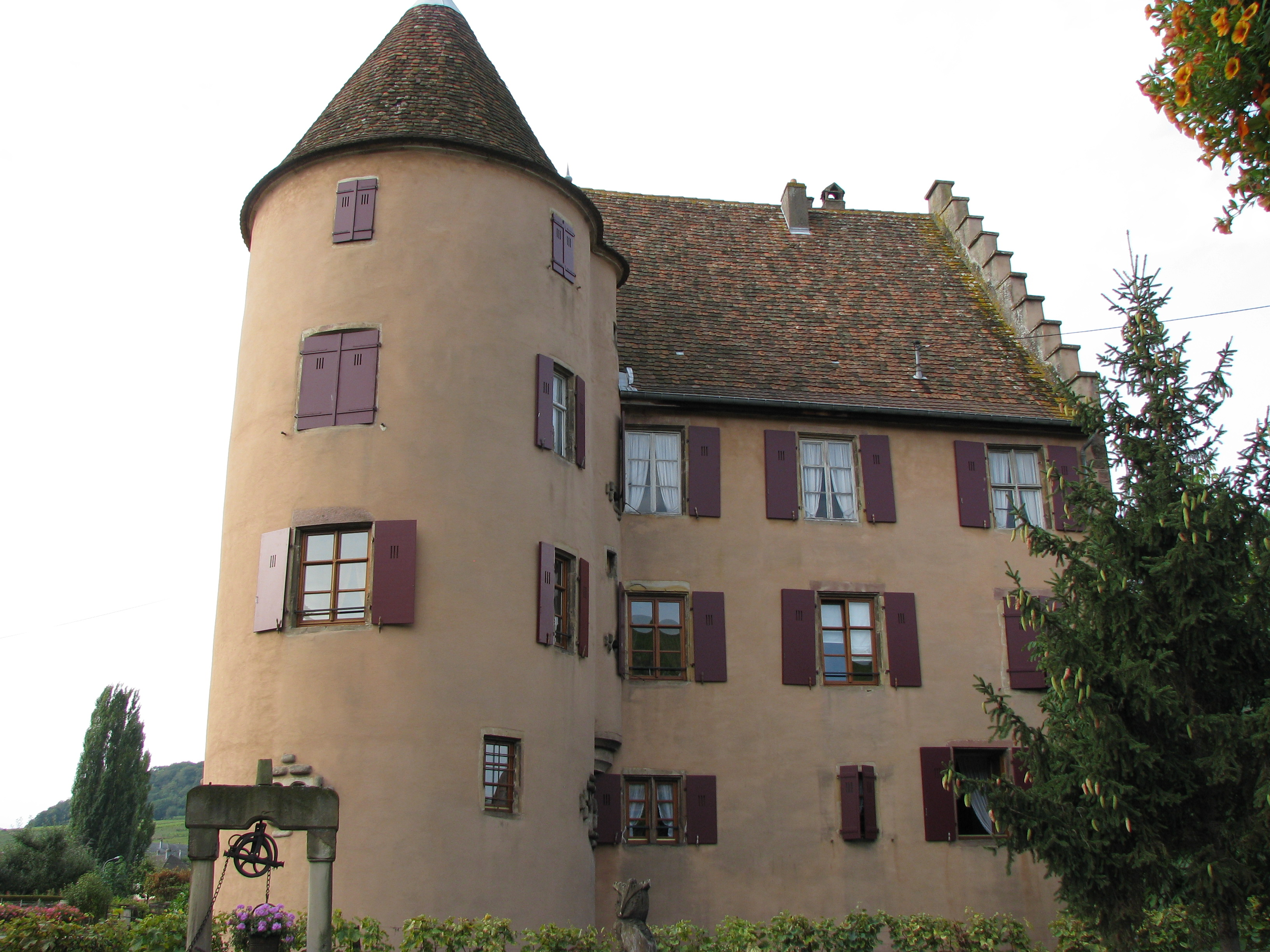 Château Wagenbourg, 25 rue de la Vallée (Inscrit, 1987) .